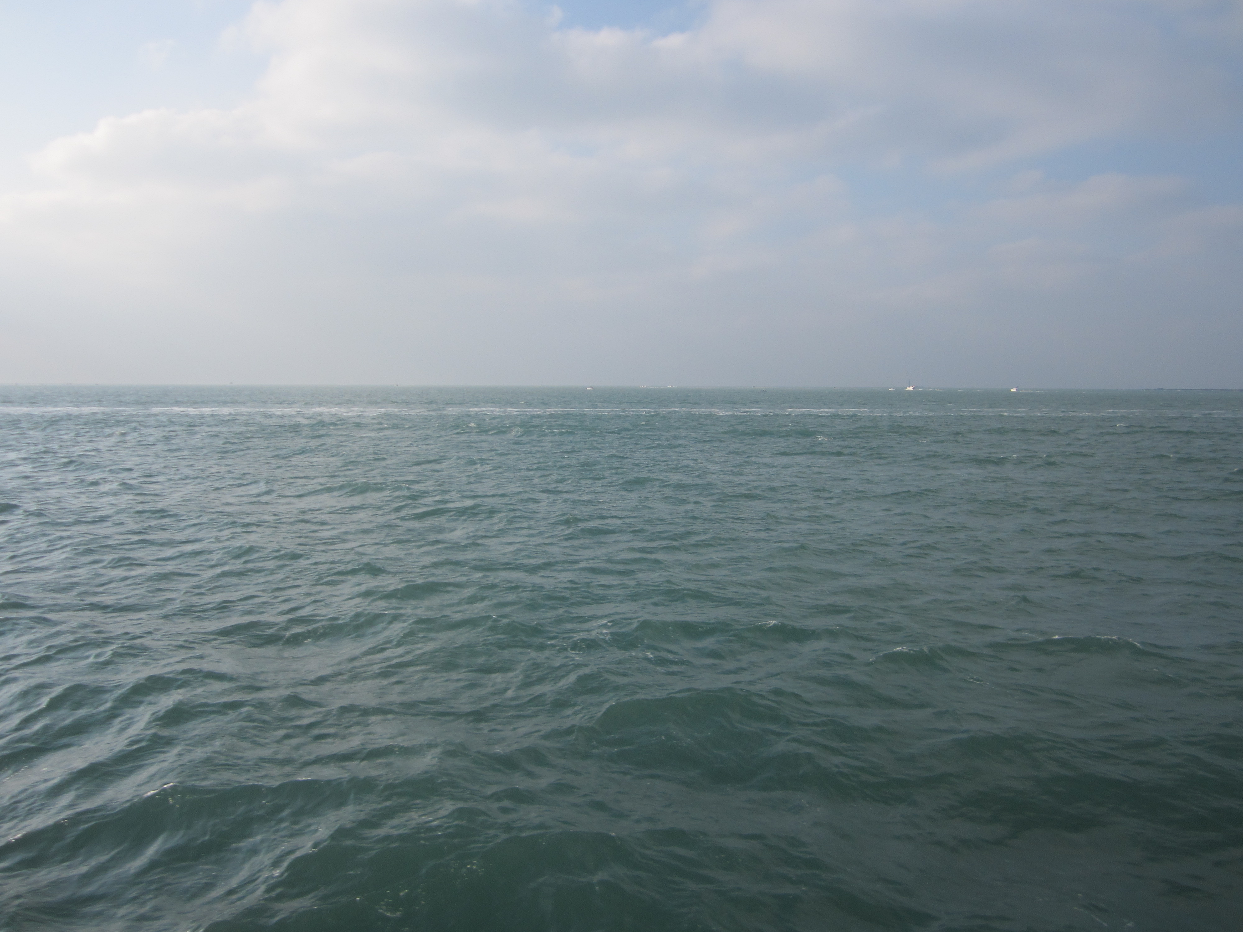 Au large des Sables d'Olonne